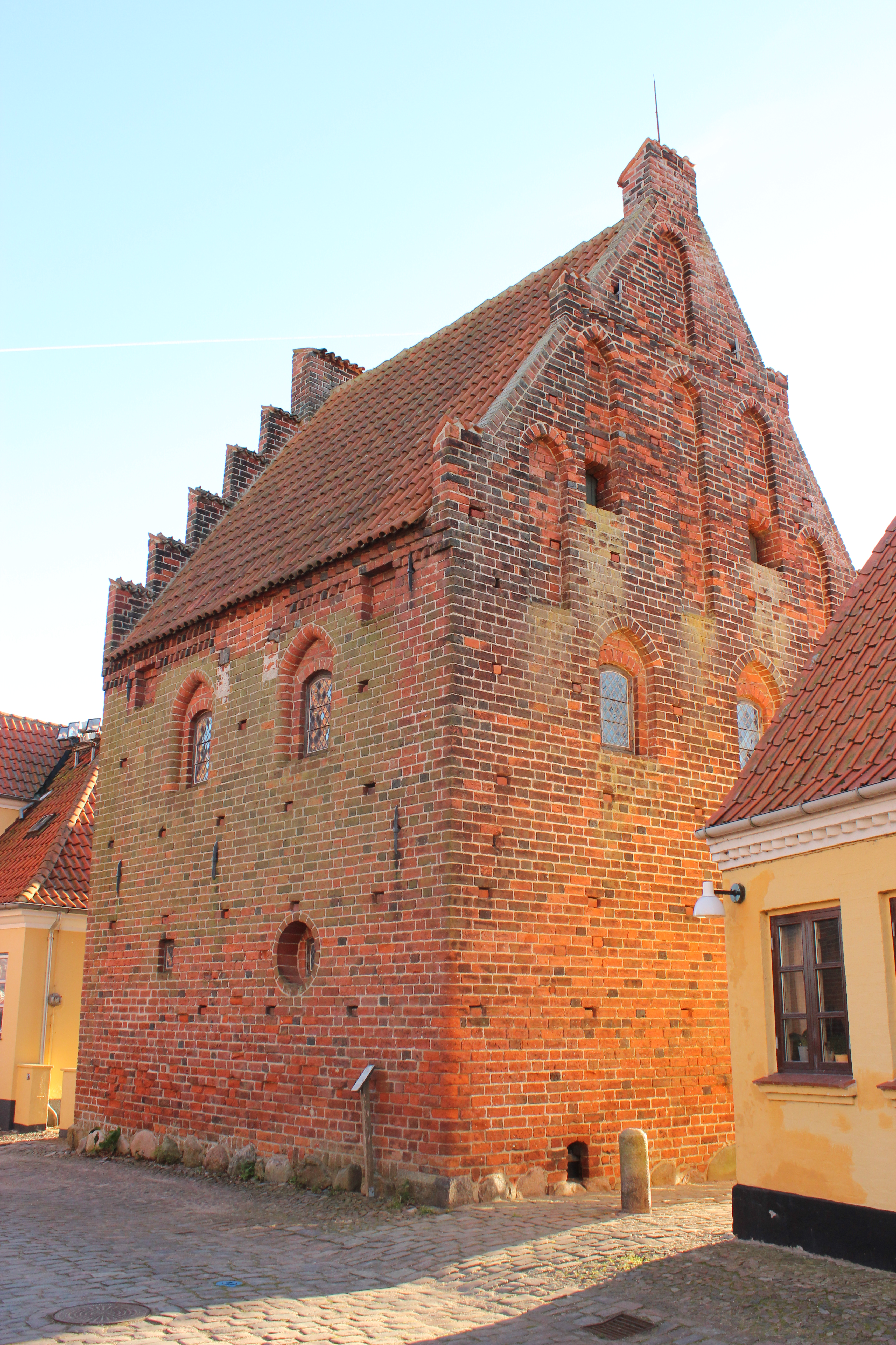 Hjørnet mod Præstegade